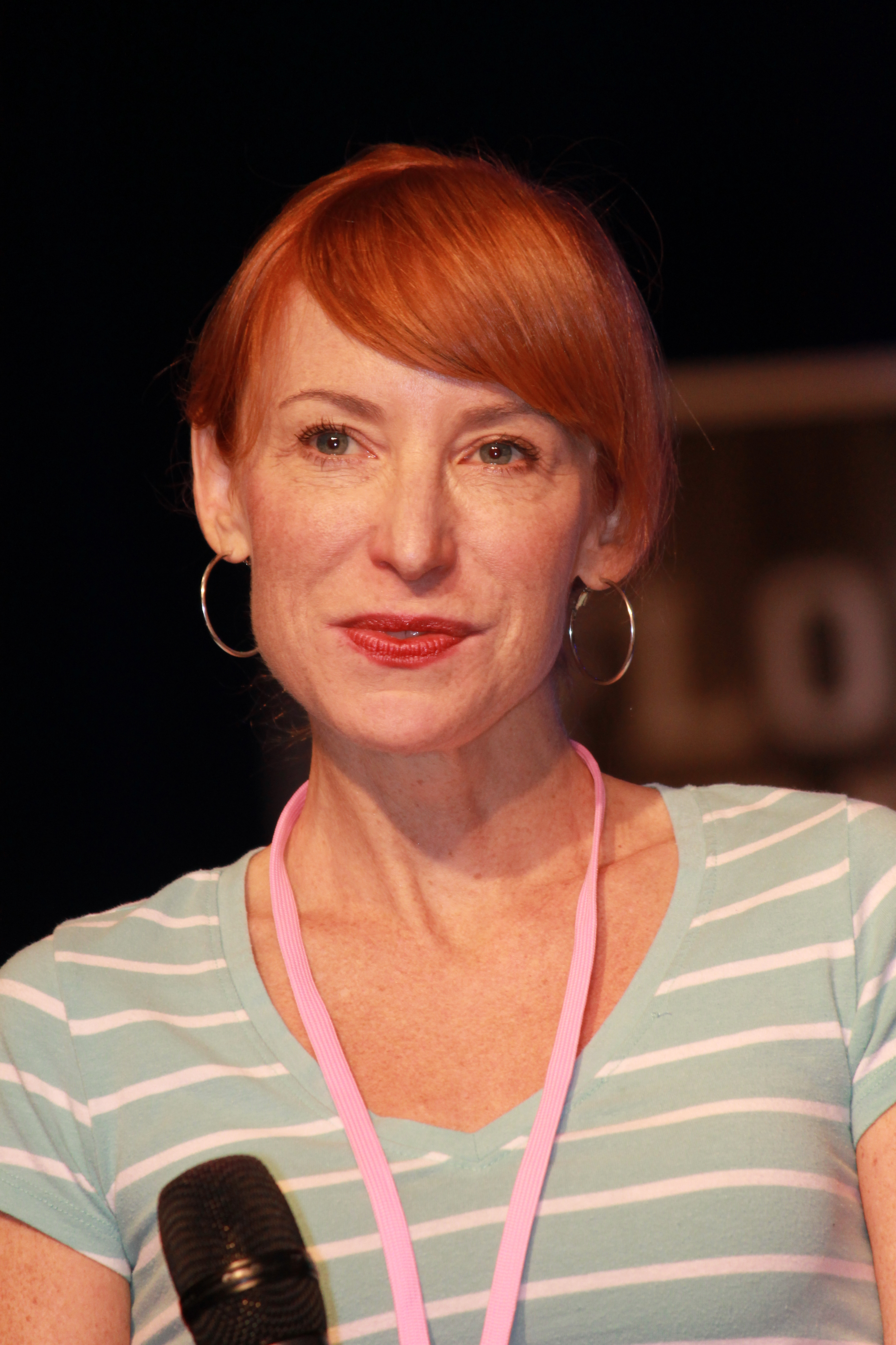 AM 11 15 sat c3_0191